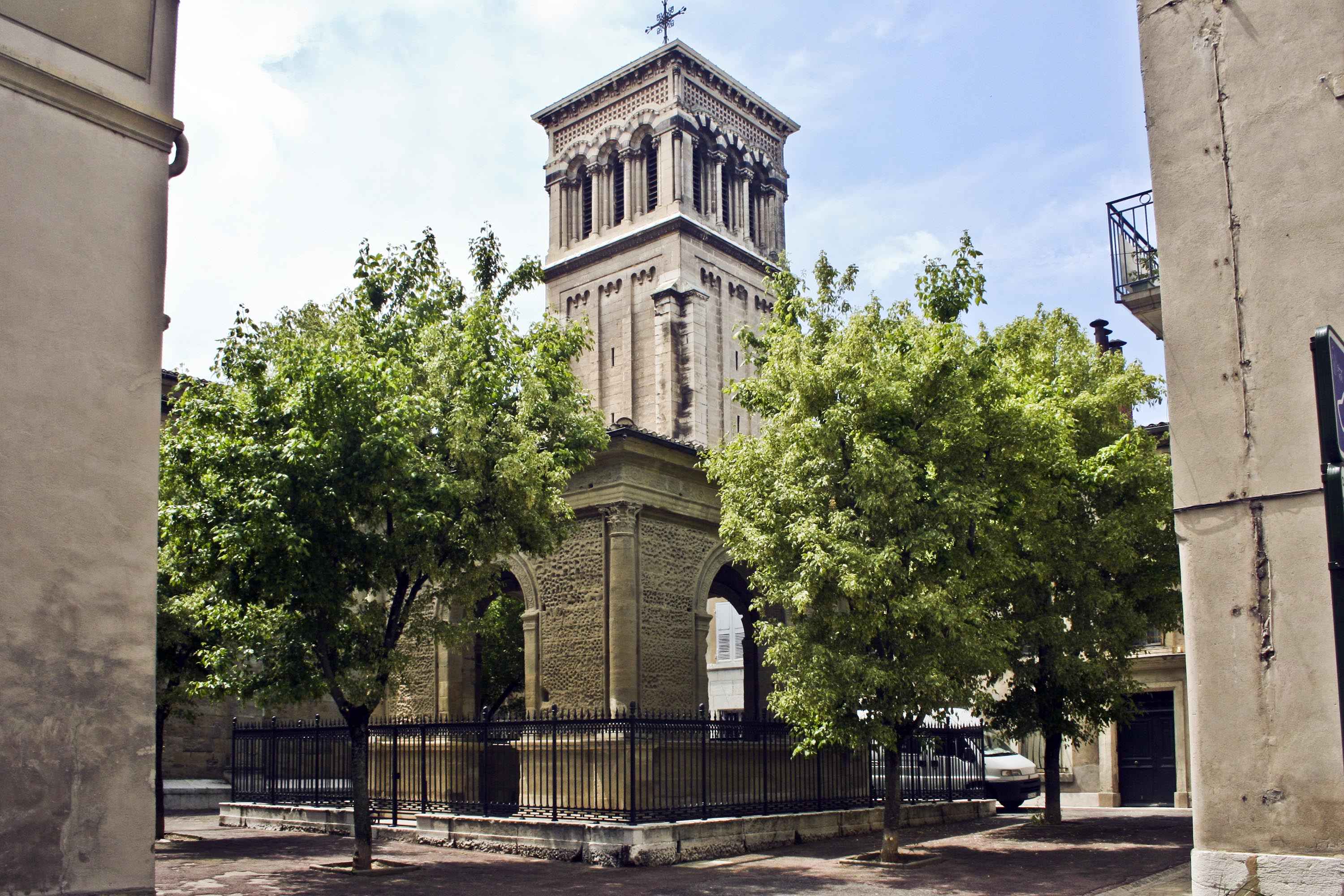 Le Pendentif et le clocher de la cathédrale Saint-Apollinaire de Valence, Drôme, France